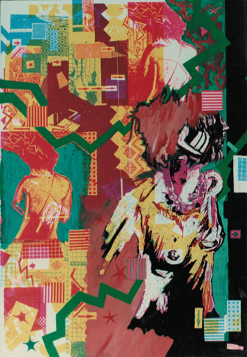 Anya aime les cicatrices, 1987, 70 x 100 cm, Siebdruck auf Karton